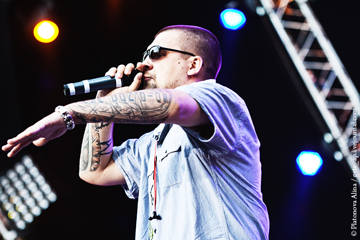 Концерт Басты и Гуфа в Зелёном Театре, 21 июля 2010 года